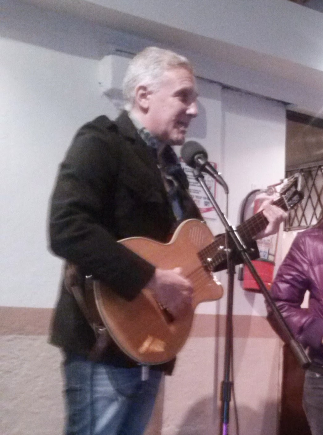 Daniel Sais (llamado el 4to Soda) en una presentación informal para amigos en abril del 2014 en Quito- Ecuador